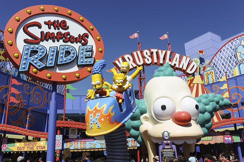 Los Angeles 2012